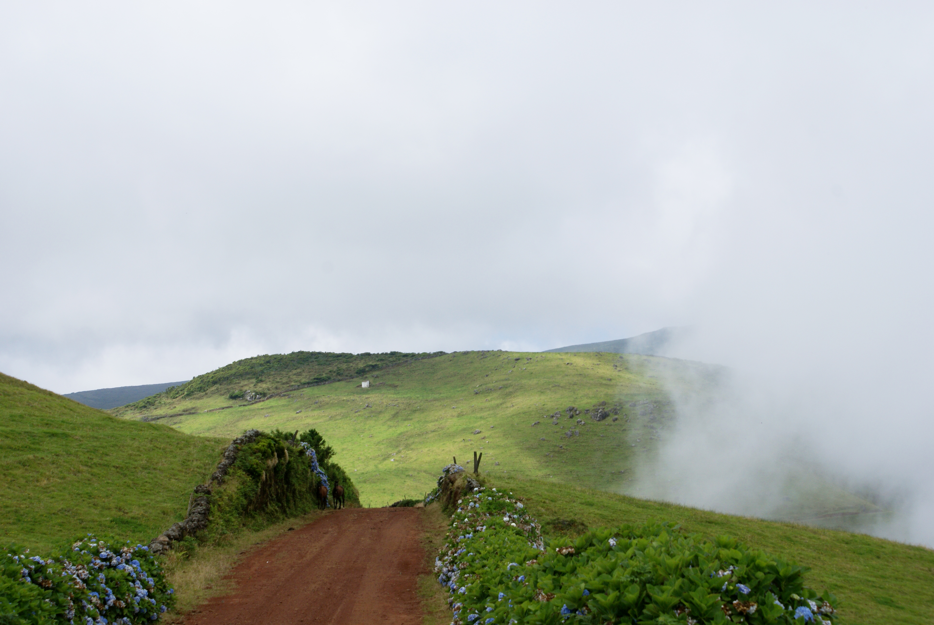 Serra do Topo, os nevoeiros caminham pela serra, Calheta, ilha de São Jorge, Açores